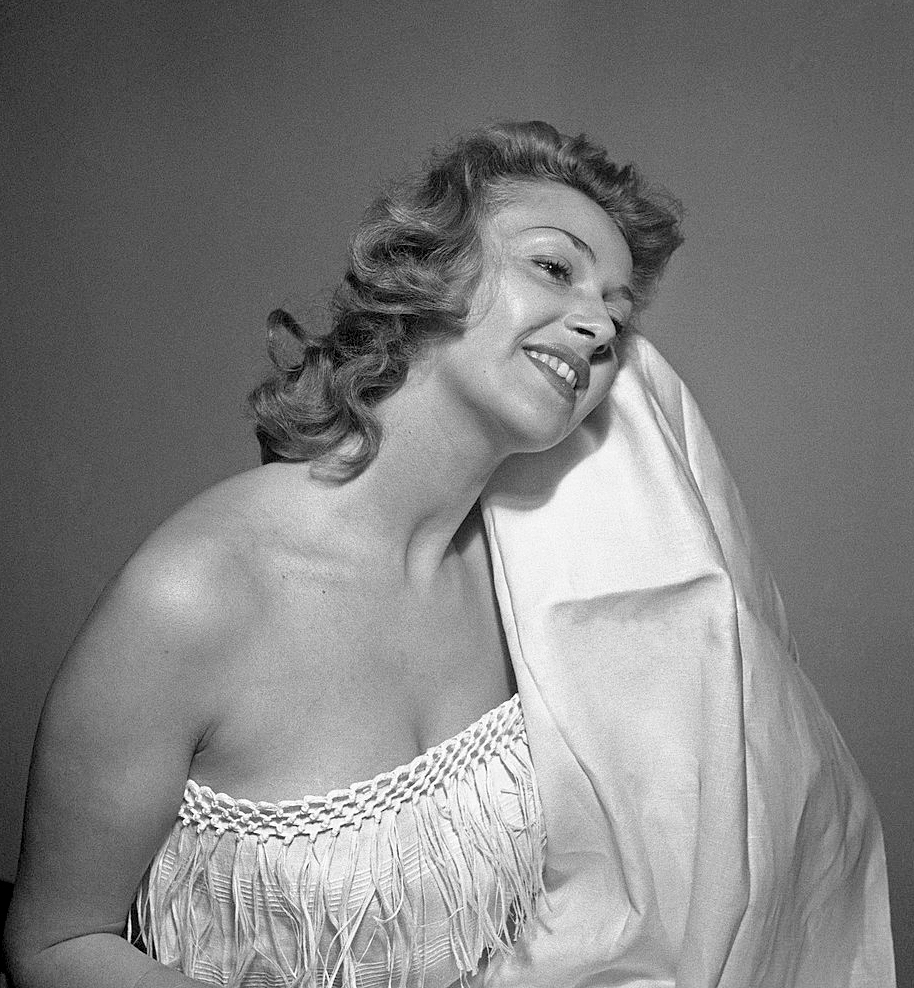 Franca Rame, Rome